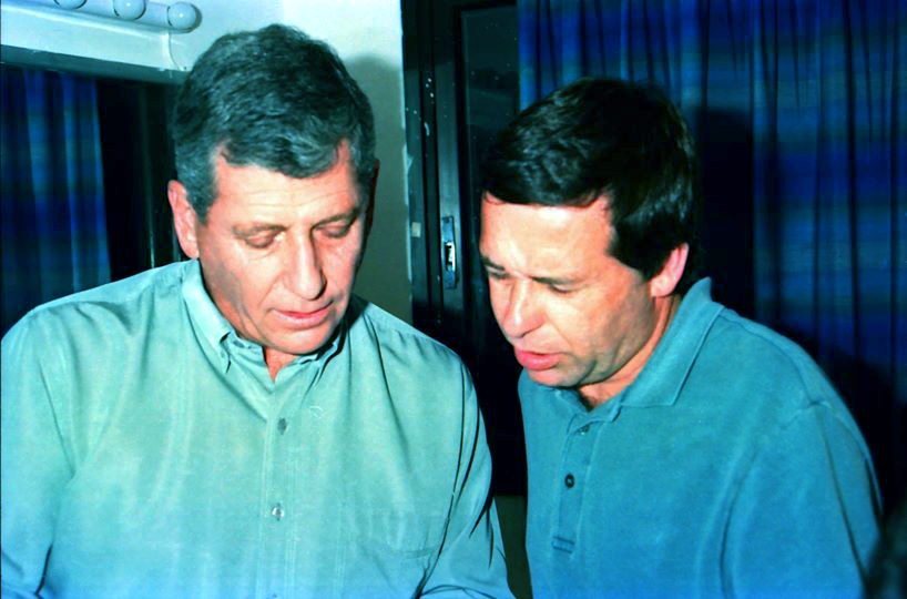 שוקי פורר עם דני ווסלי